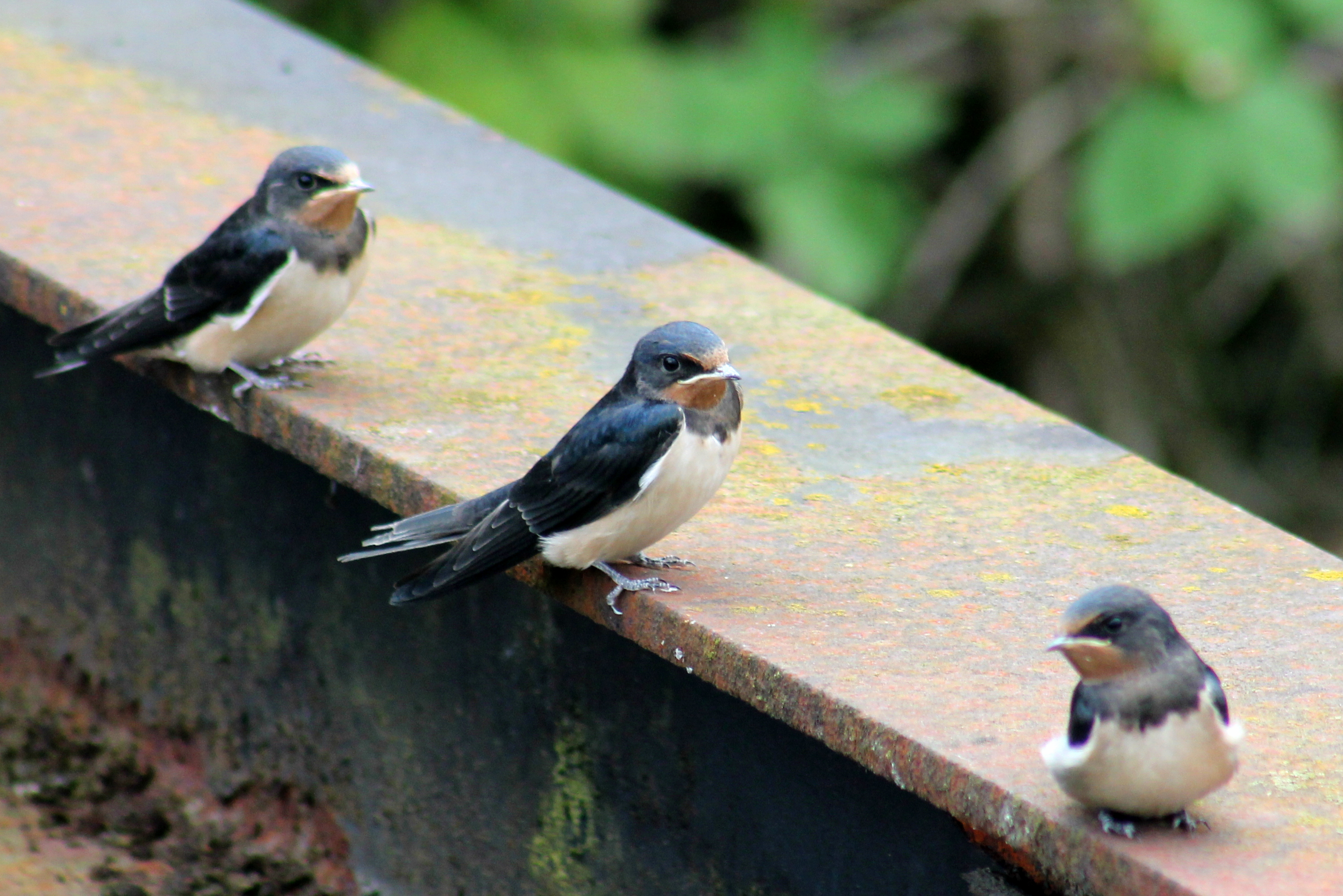 Juveniele boerenzwaluwen in Tilburg